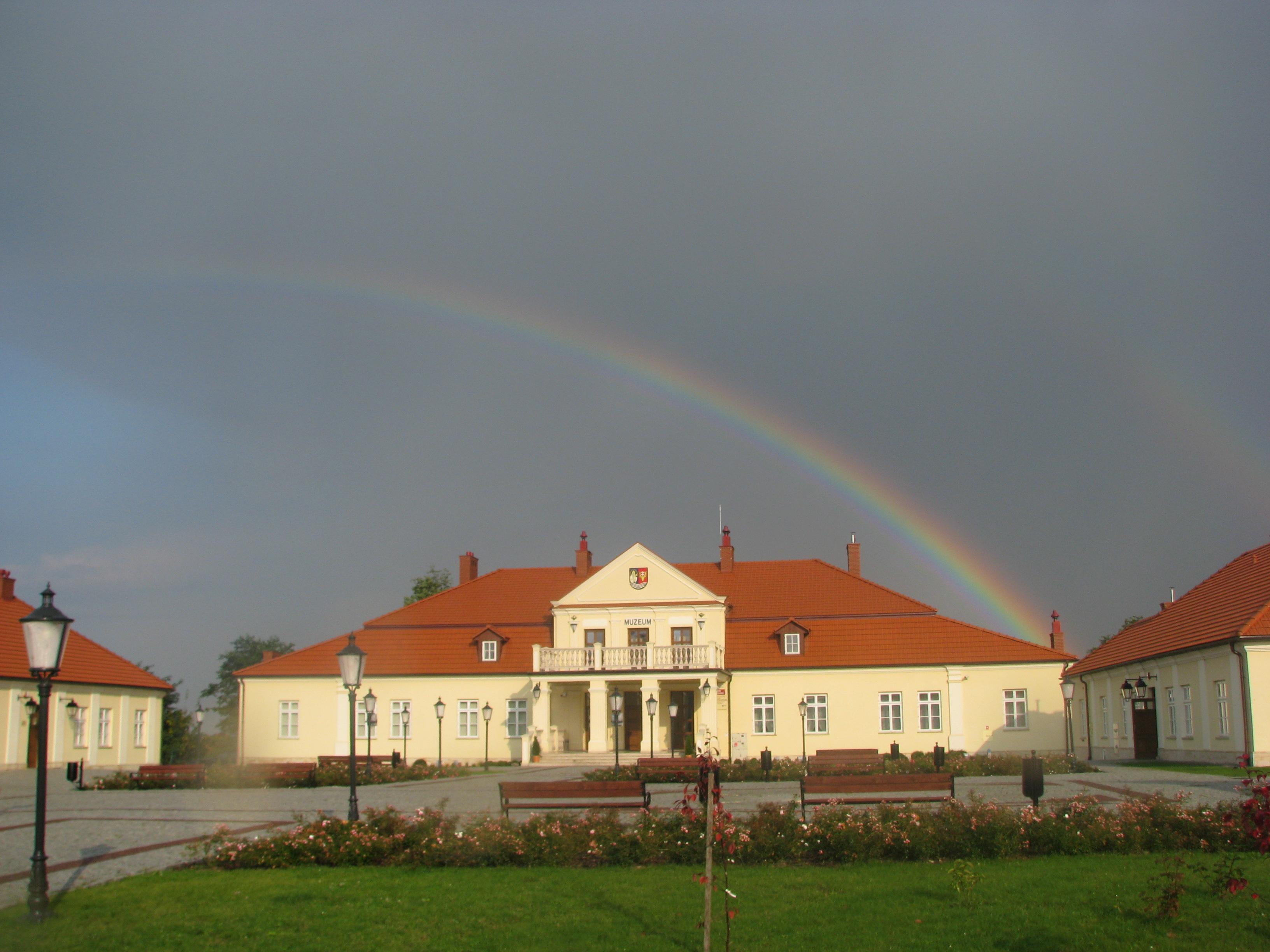 Leżajsk, dwór starościński, ob. Muzeum Ziemi Leżajskiej, 1760-1770, 1933